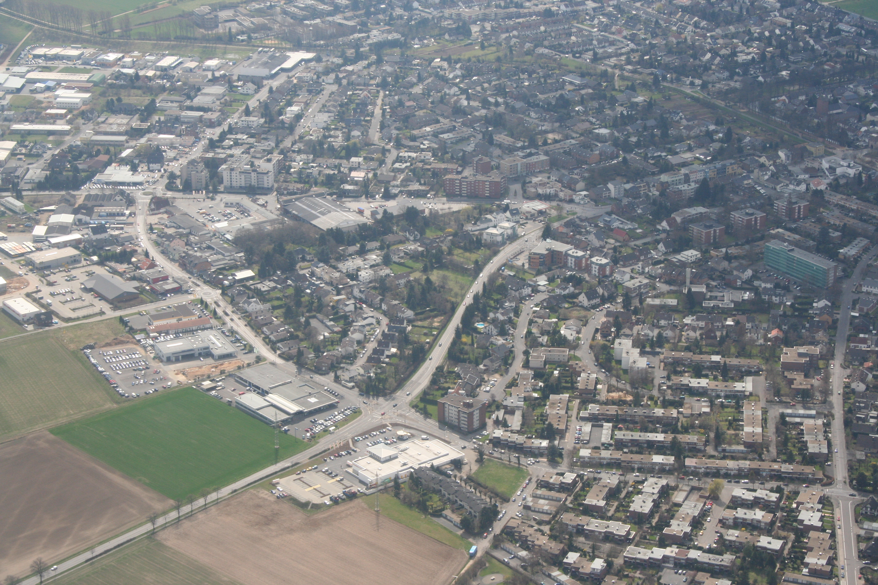 Lechenich, östliche Stadtteile